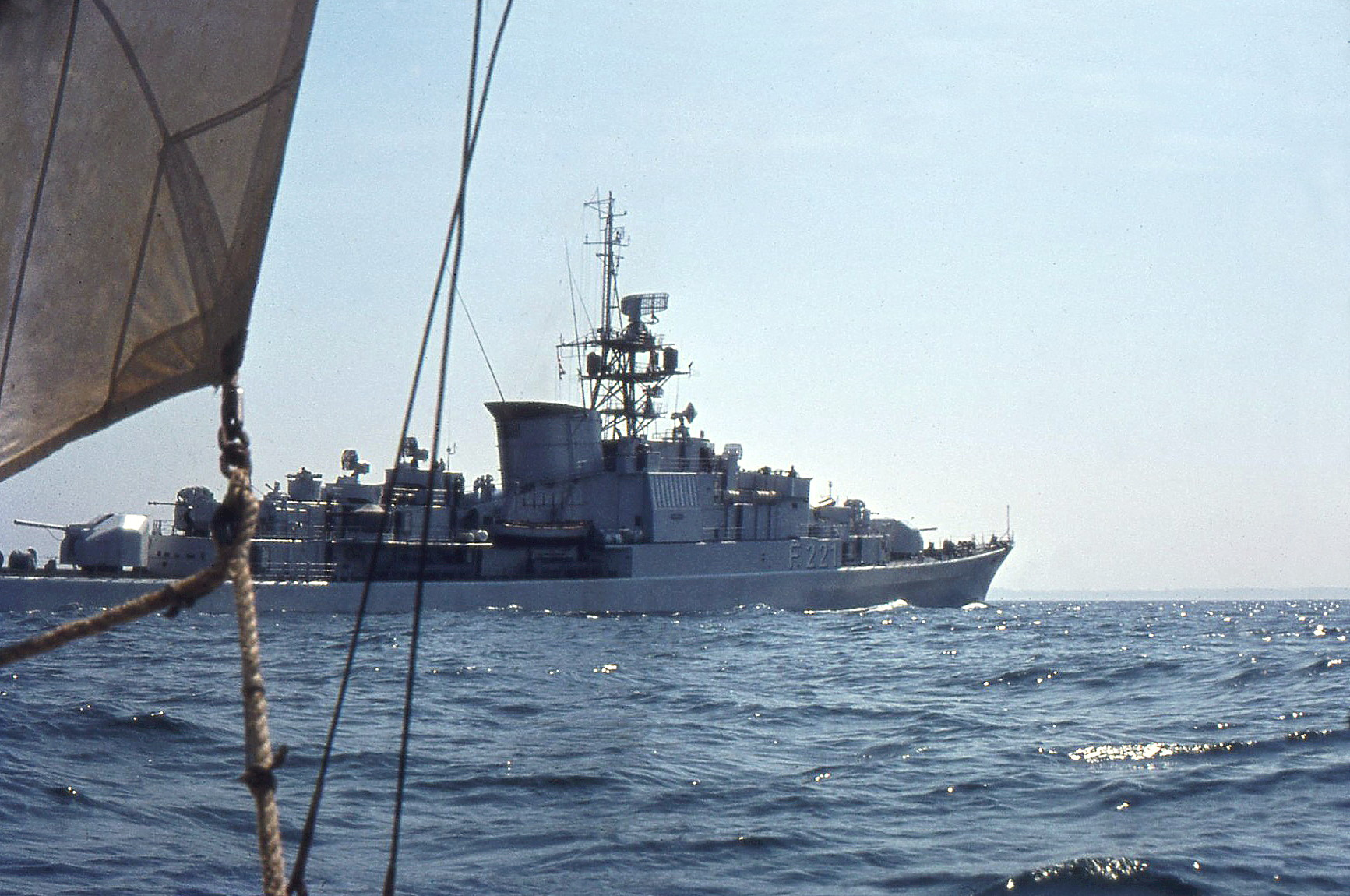 Im Segelboot auf der Eckernförder Bucht, Sommer 1963, im Hintergrund die Fregatte F 221